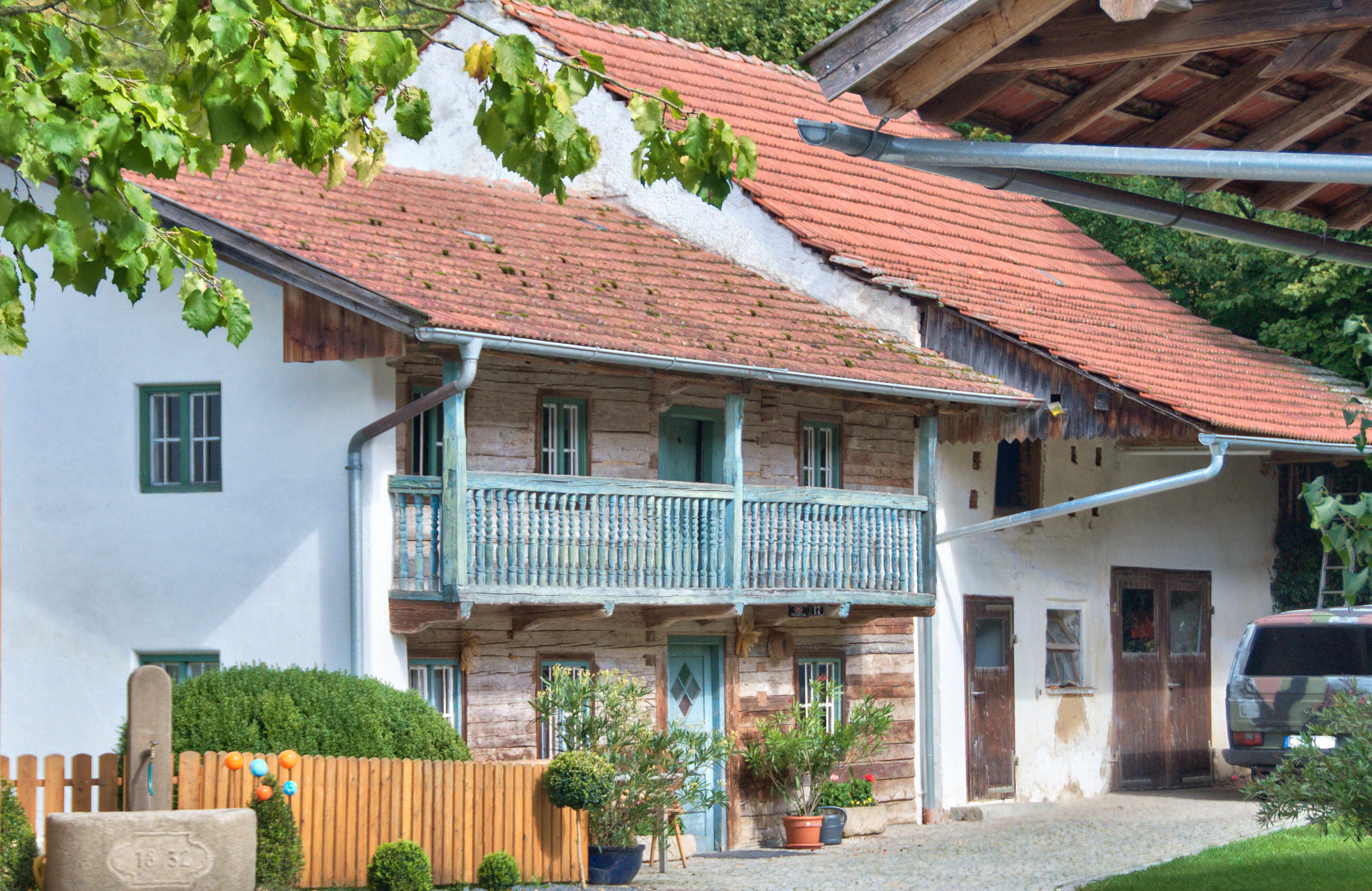 Ehemaliges Kleinbauernhaus: zweigeschossiger Bau mit Traufschrot, im Kern 18. Jahrhundert.This is a photograph of an architectural monument.